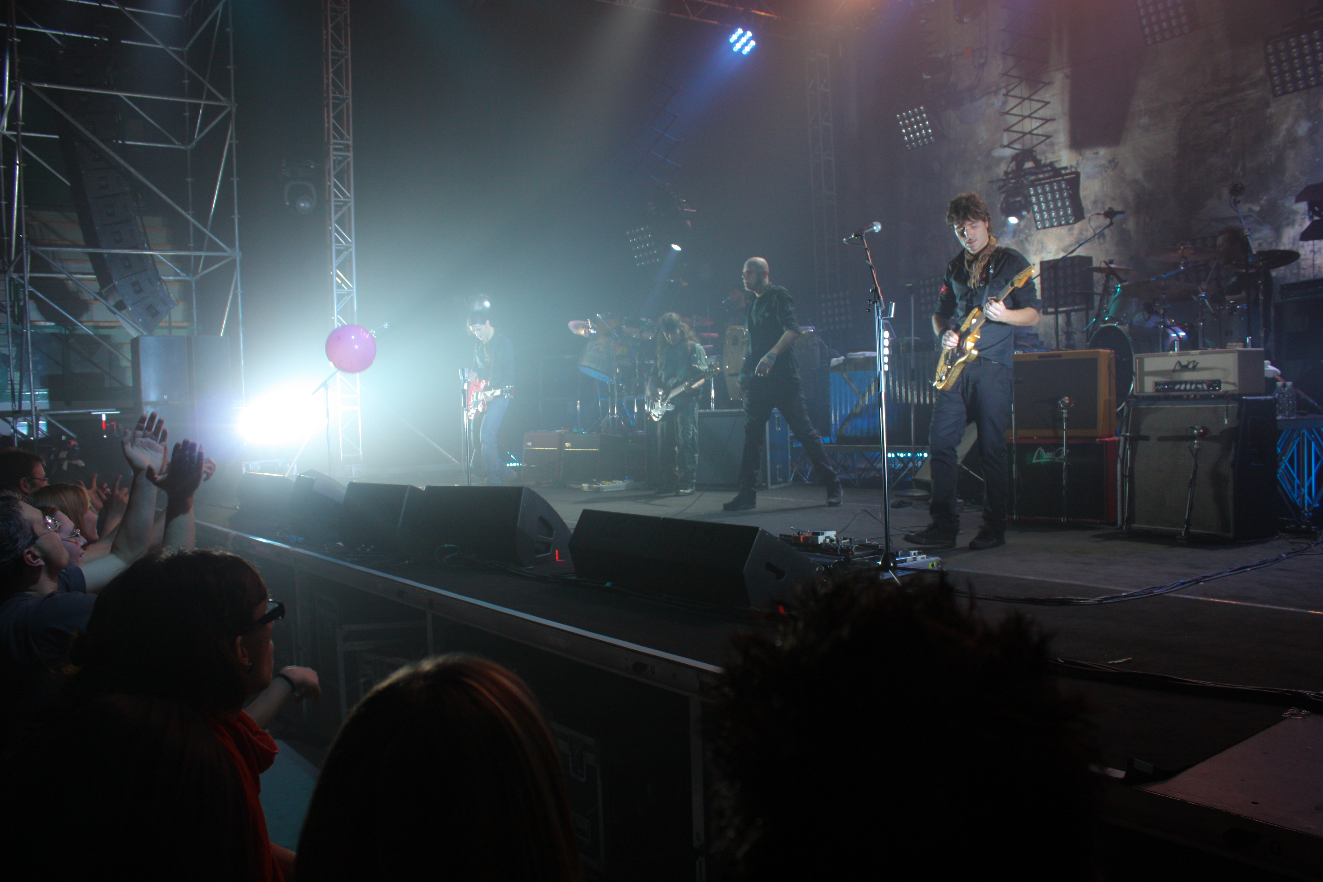 Negrita - HELLdorado Tour - Borgo Valsugana